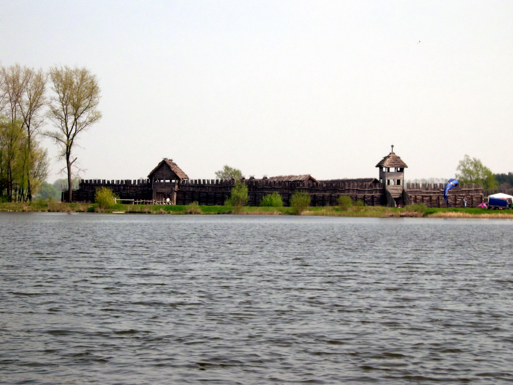 Osada w Biskupinie - widok z jeziora